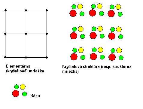 Obr. 2 Odvodenie plošnej kryštálovej štruktúry.